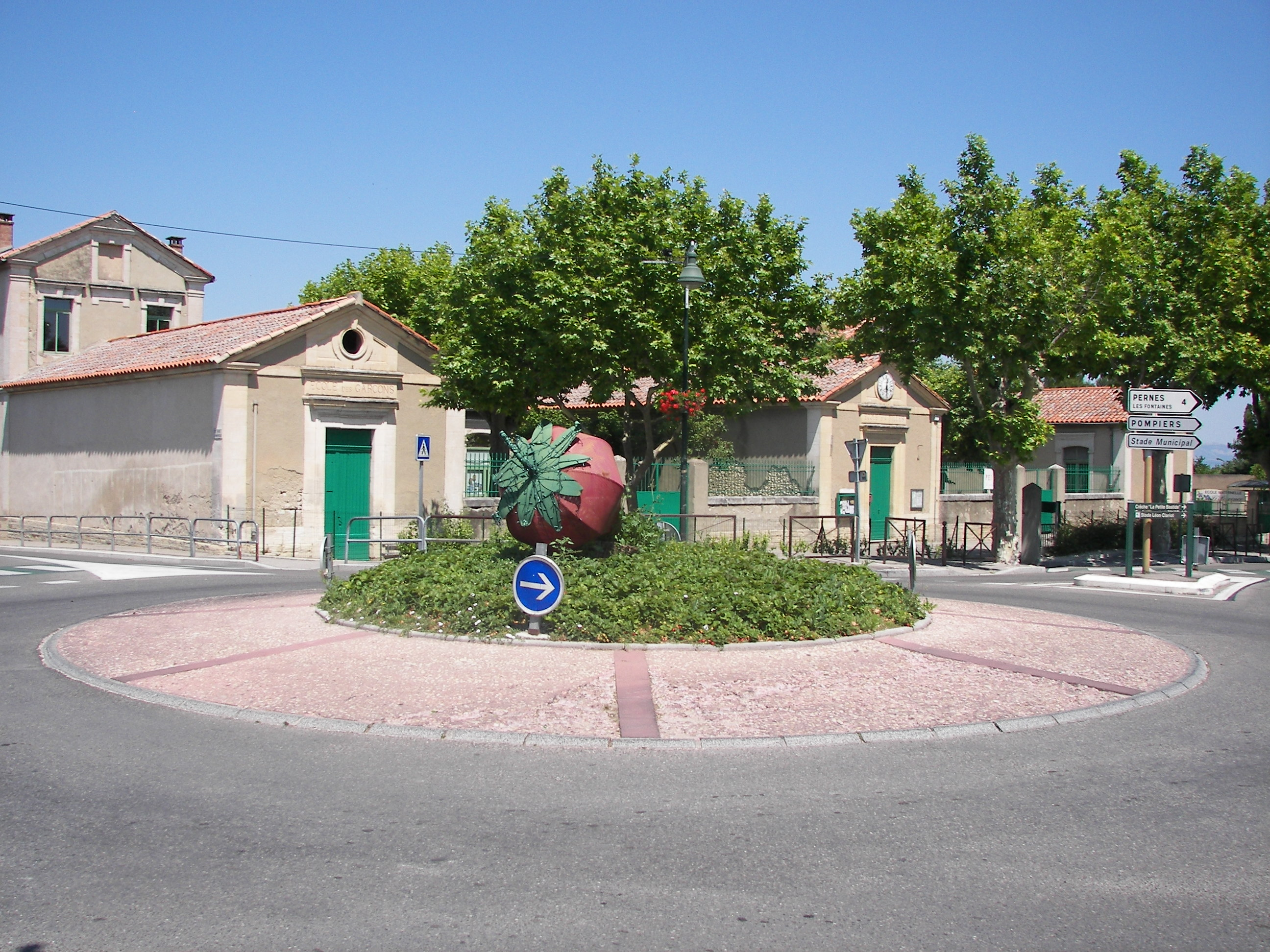 Photo prise par moi même le 21 Juin 2008 à Velleron (Vaucluse)